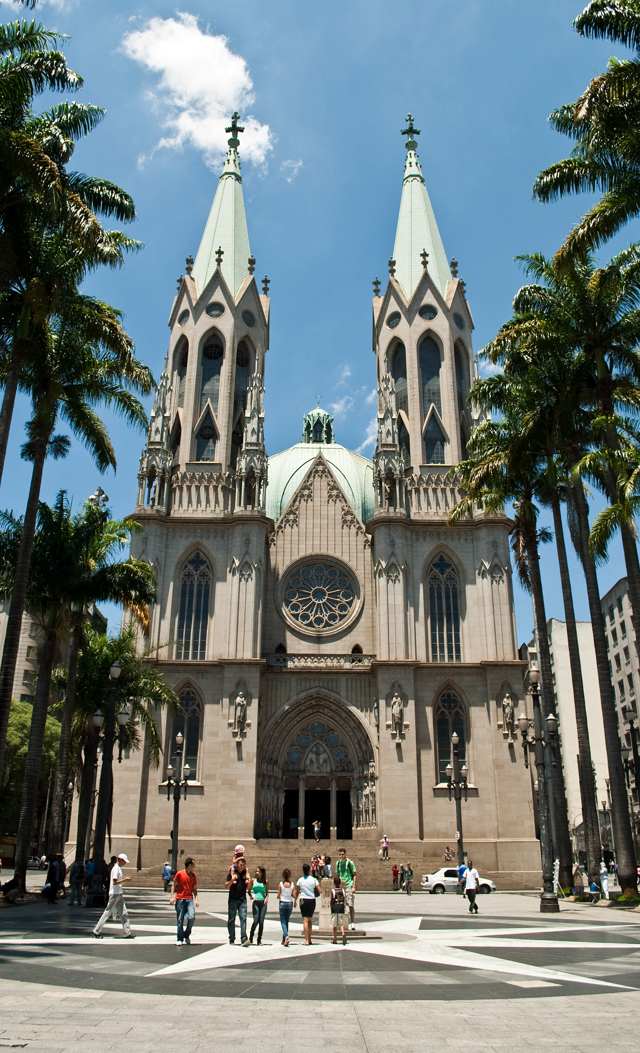 Praça e Catedral da Sé, em São Paulo, Brasil.